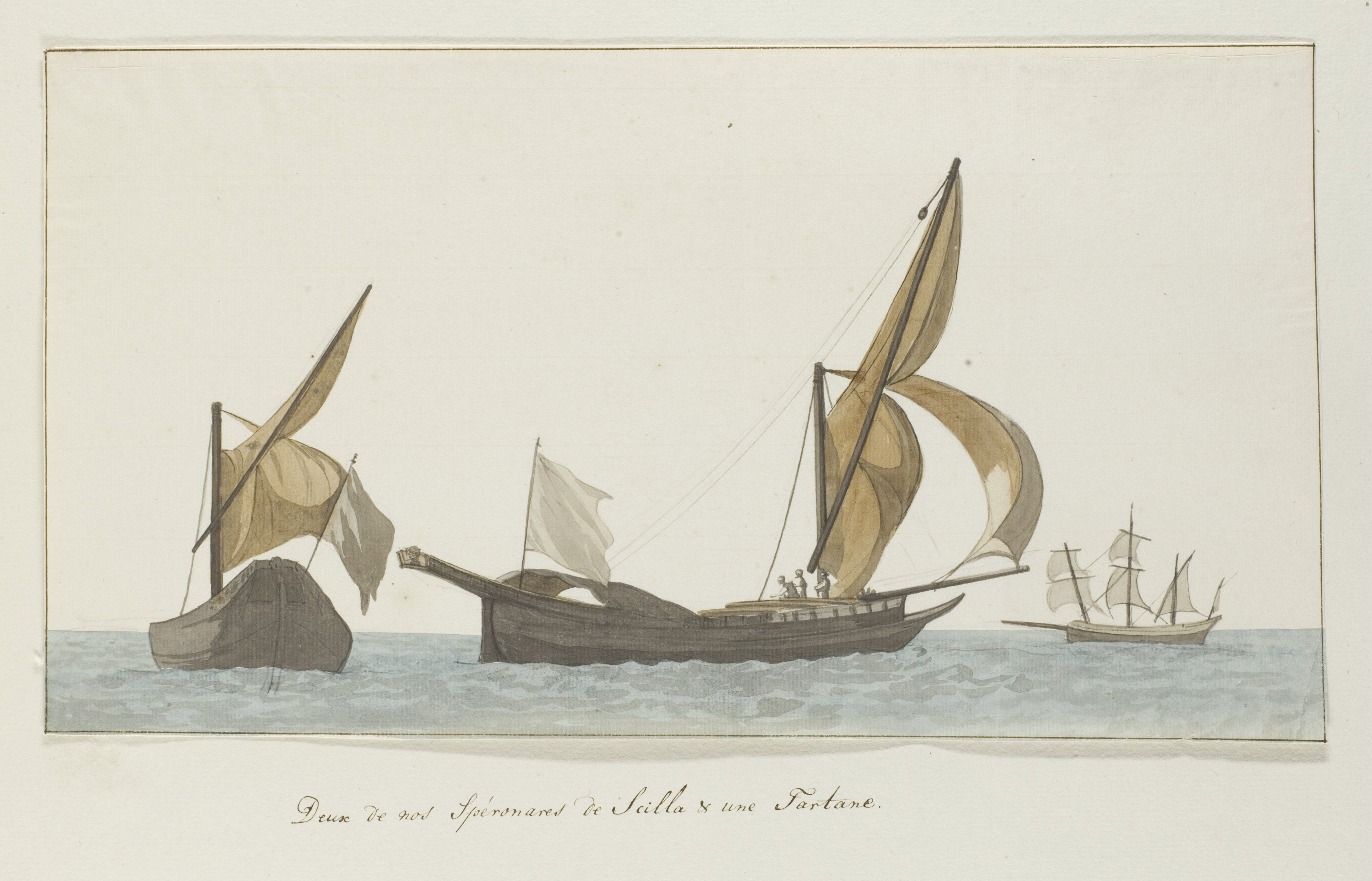 IdentificatieTitel(s): Drie schepen: twee spéronares van Scilla en een tartanesDeux de nos Spéronares de Scilla & une Tartane (titel op object)Voyage en Italie, en Sicile et à Malte - 1778 (serietitel)Objecttype: tekening aquarel Objectnummer: RP-T-00-493-35ACatalogusreferentie: Niemeijer&De Booy 186Opschriften / Merken: nummer, verso linksboven, handgeschreven: ‘No 152 Deux de nos Spéronares de Scilla & une Tartane’Omschrijving: Tekening uit het album 'Voyage en Italie, en Sicile et à Malte', 1778.VervaardigingVervaardiger: tekenaar: Louis DucrosPlaats vervaardiging: SiciliëDatering: 1778Fysieke kenmerken: zwart krijt, aquarel, penseel in grijsMateriaal: papier krijt waterverf Techniek: penseelAfmetingen: blad: h 203 mm × b 380 mmVerwerving en rechtenCredit line: Schenking van mevrouw Hansen-van den Brugghen, Den HaagVerwerving: schenking 1948Copyright: Publiek domein